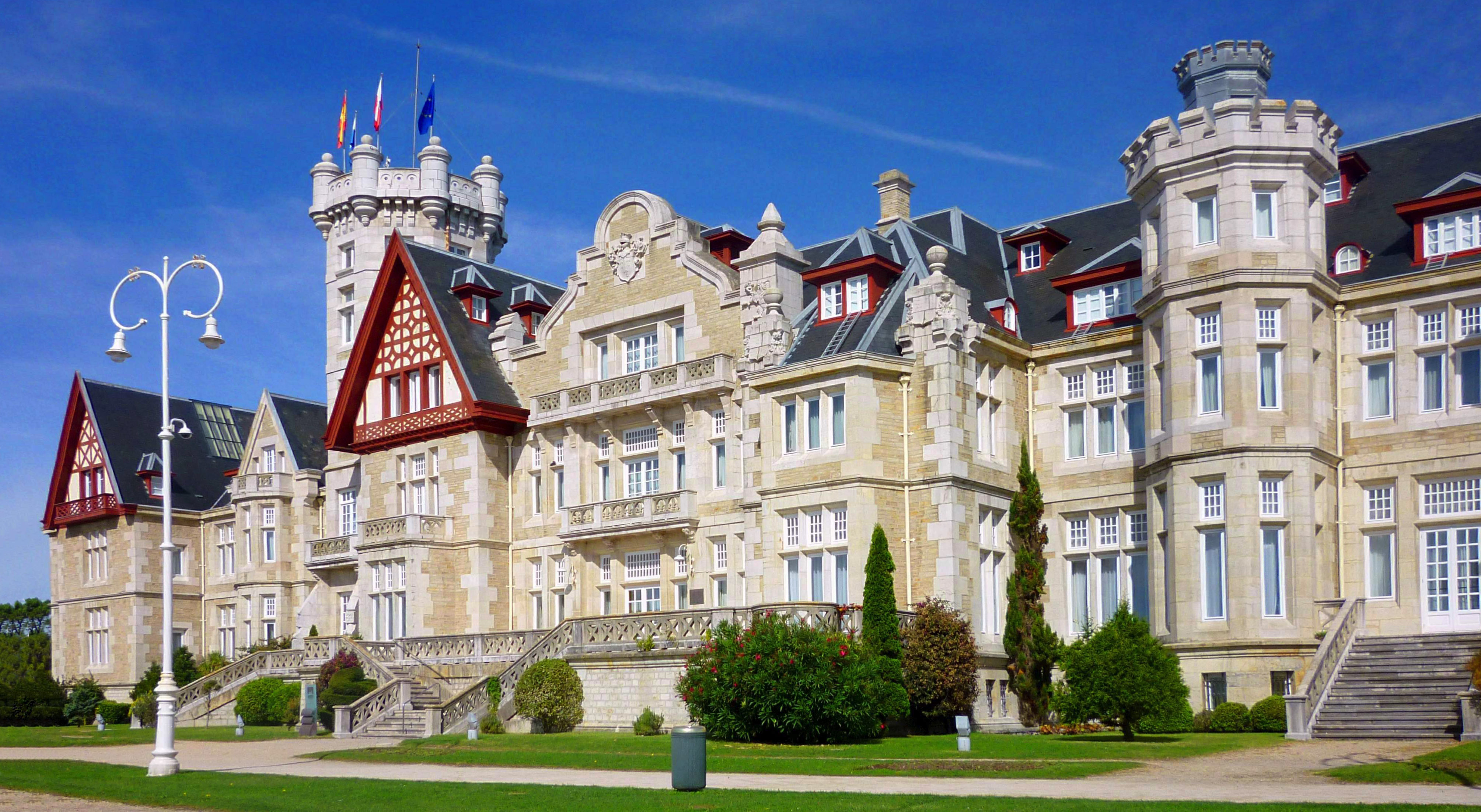 Palacio de la Magdalena (Santander)